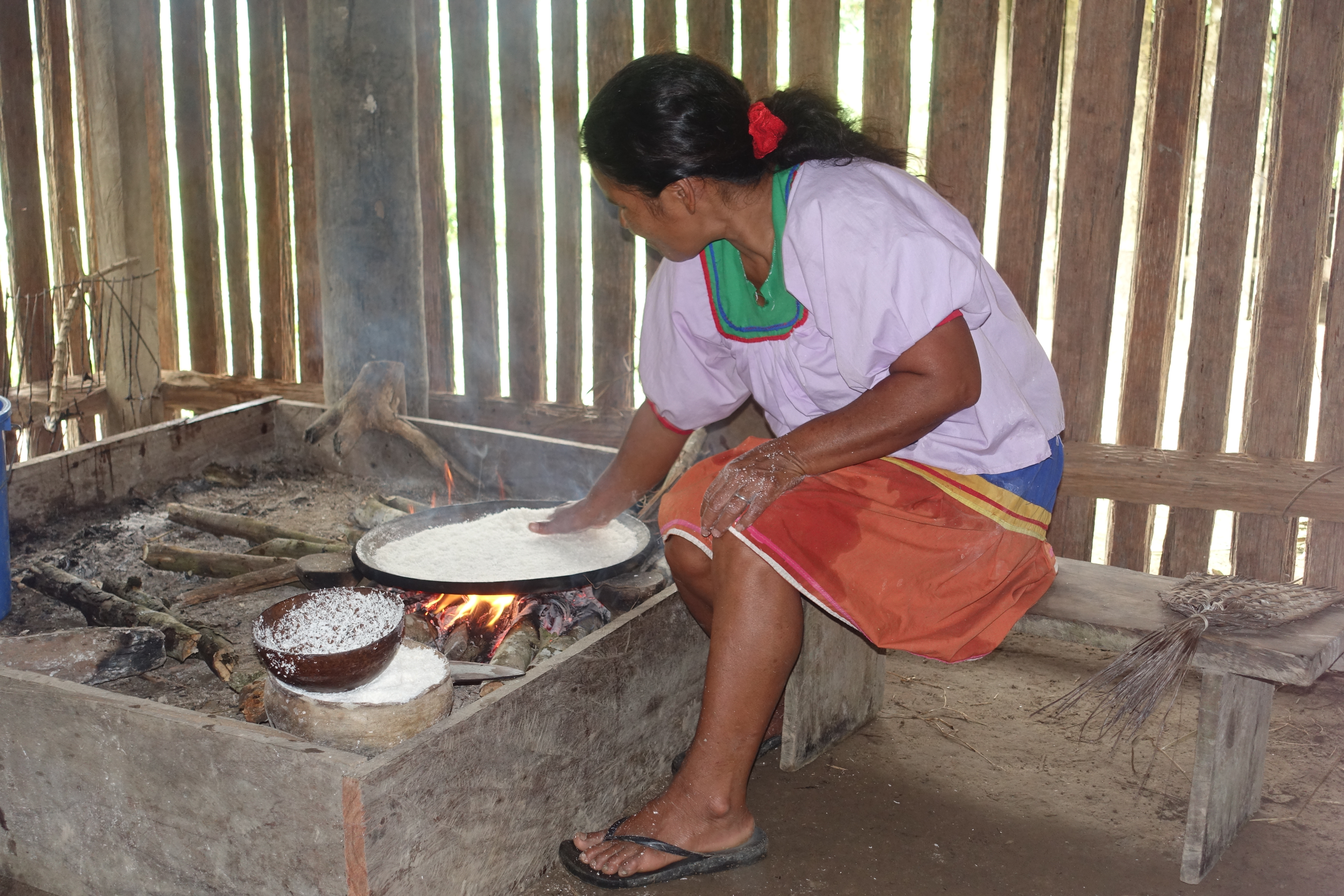 Herstellung von Maniokfladen, Siona Village San Victoriano, Wildtier-Reservat Cuyabeno (Maniok wird zu Mehl gerieben, die Flüssigkeit ausgepresst und anschließend auf der Pfanne gebacken)